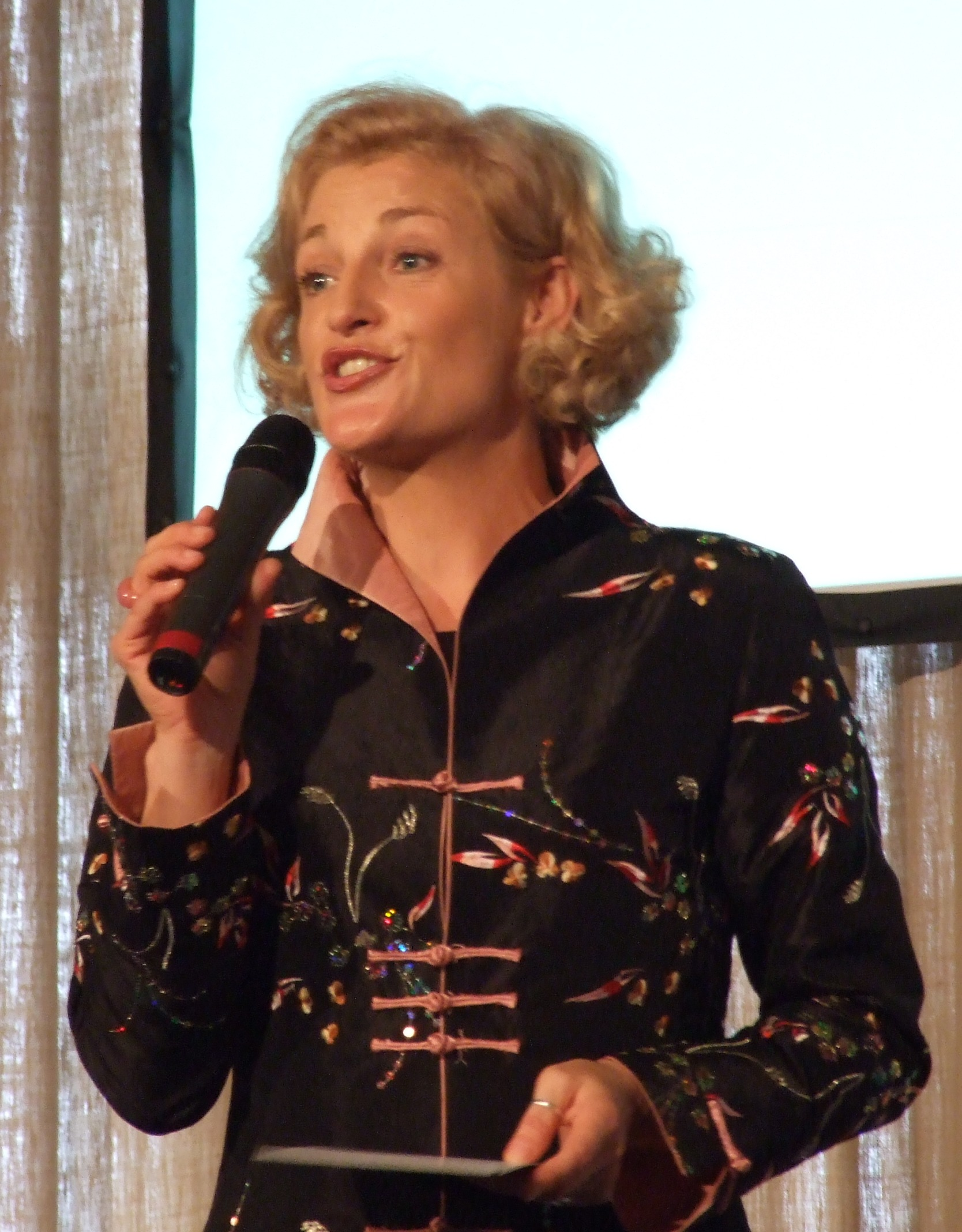 Annette Gerlach bei der Moderation der Verleihung der Karlsmedaille für europäische Medien 2009. Sie moderiert Arte Culture